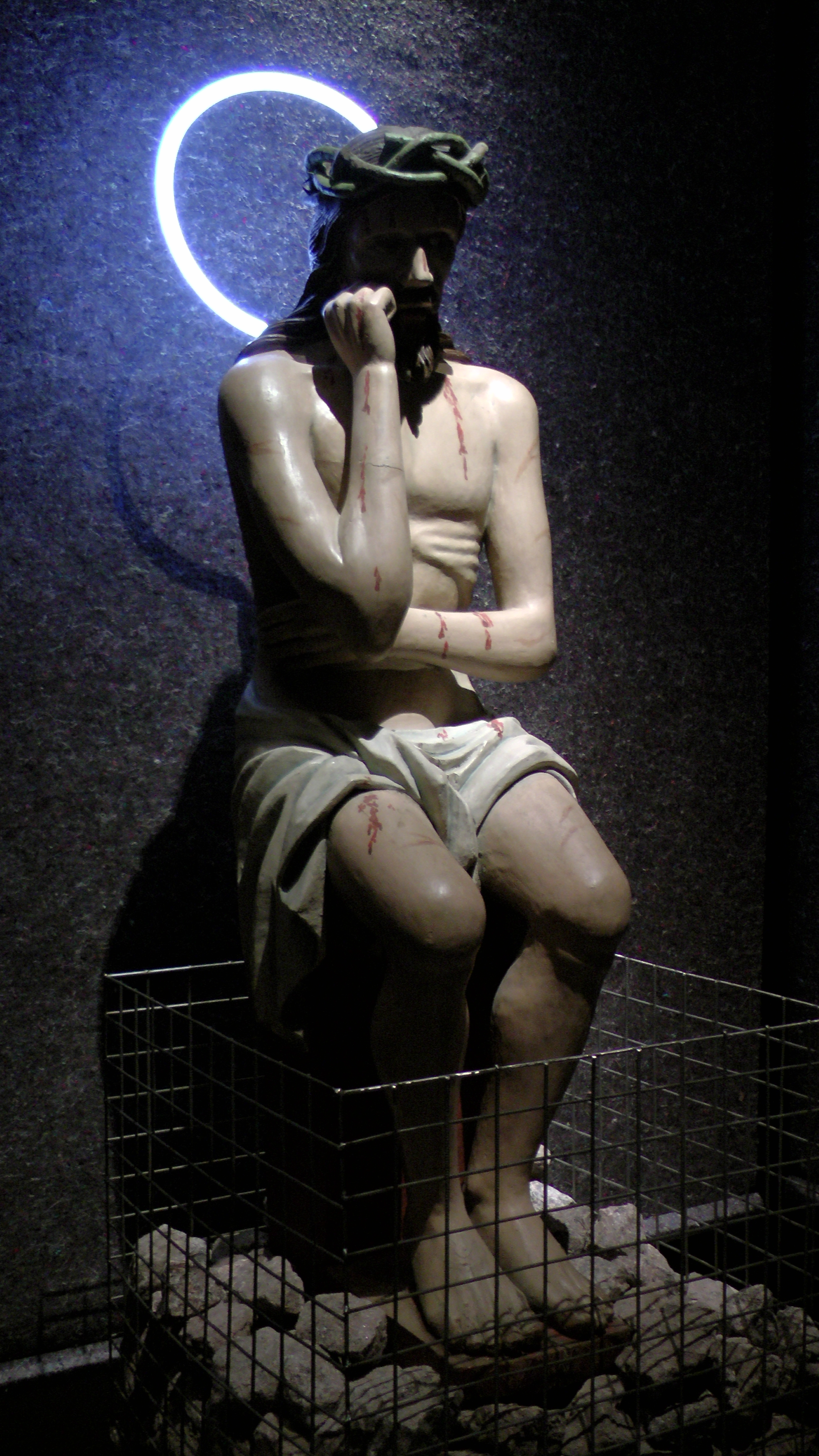 Христос в темнице. Череповецкое музейное объединение, XIX век. Дерево, левкас, темпера, резьба. Поступил из церкви во имя Архангела Михаила села Нелазское Череповецкого района Вологодской области в 1939 году. Фотография сделана на выставке "Христос в темнице" в Санкт-Петербурге